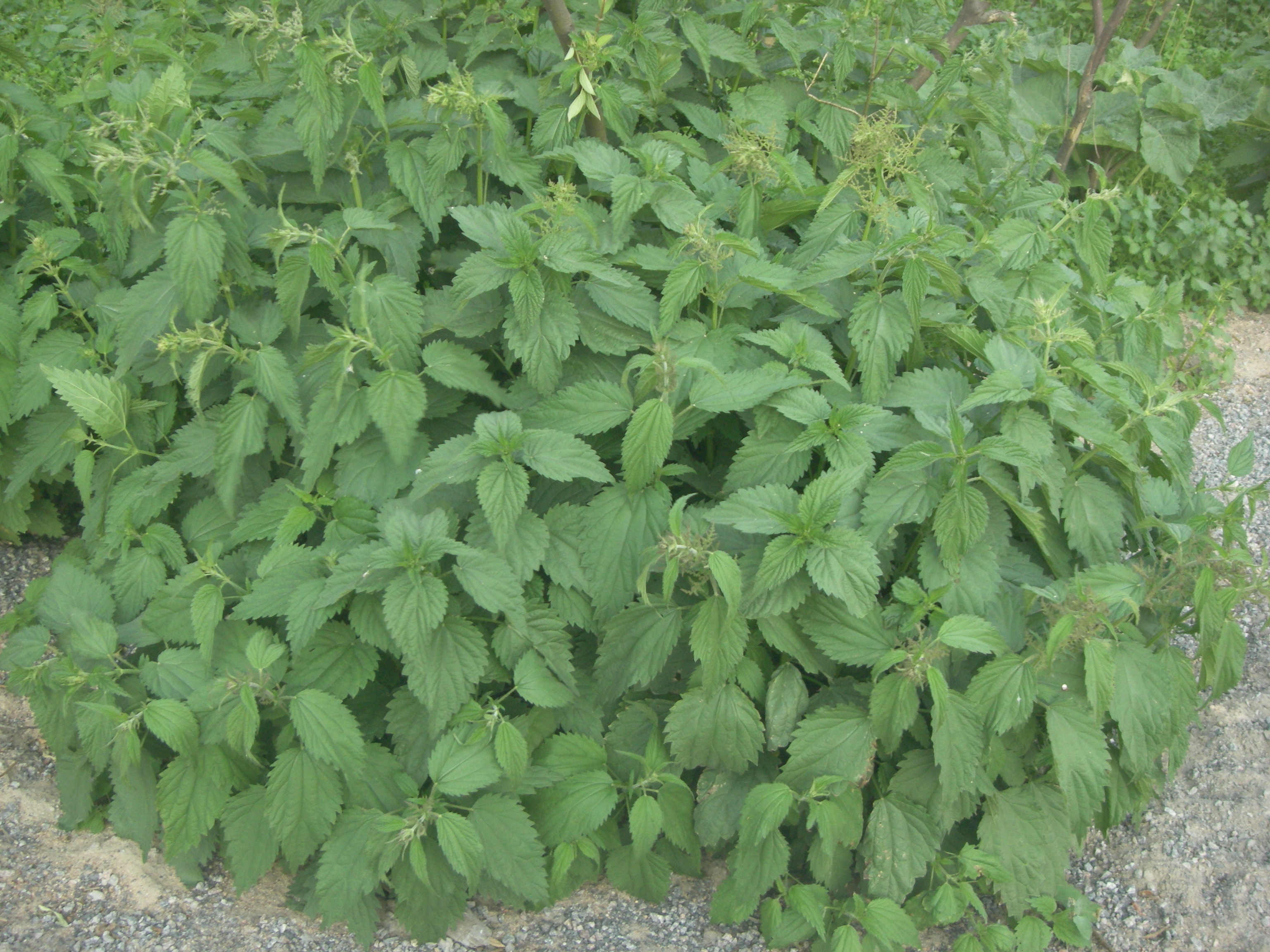 Заросли крапивы (Санкт-Петербург, Таврический сад)